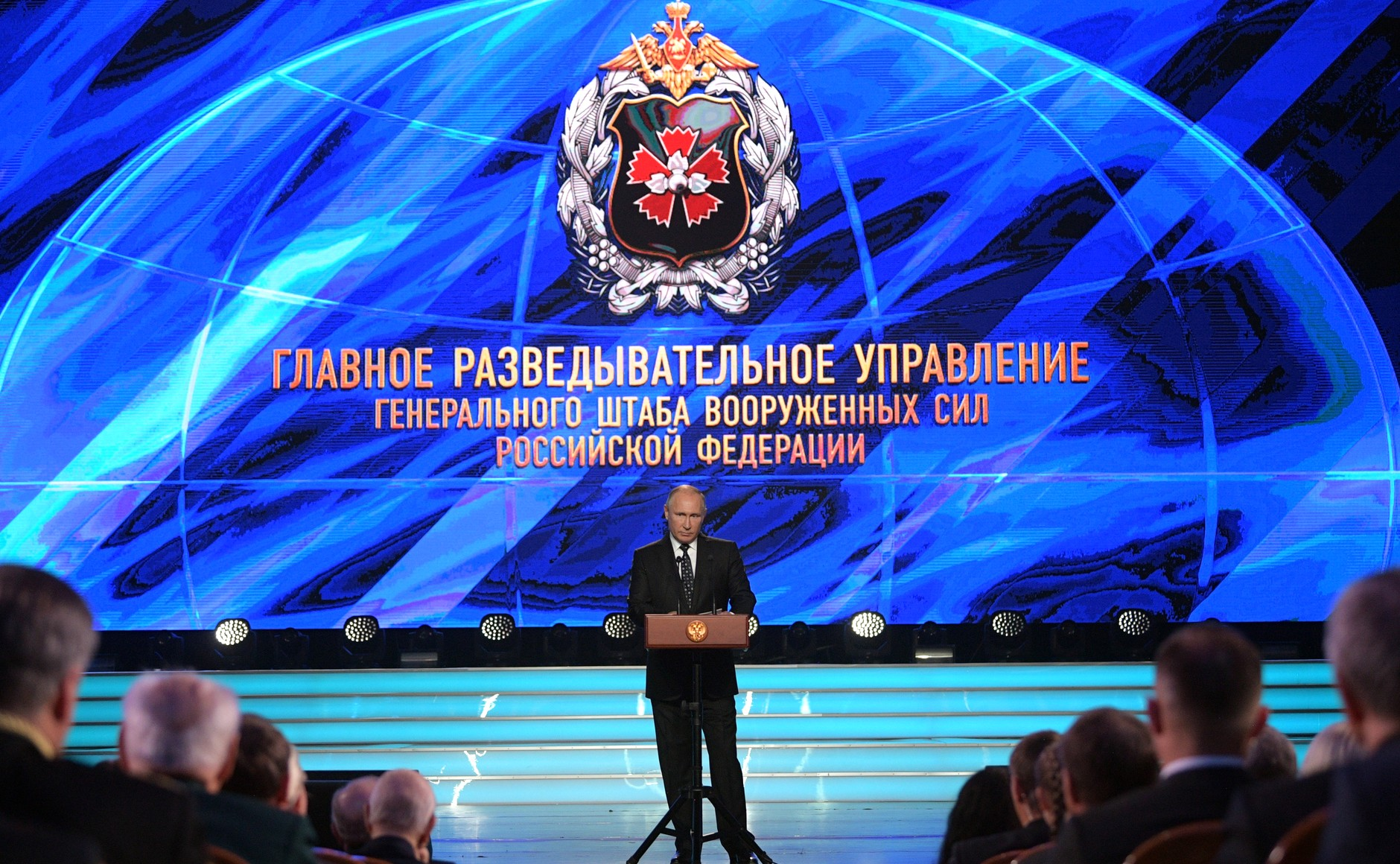 Президент Российской Федерации – Верховный Главнокомандующий Вооруженными Силами Российской Федерации Владимир Путин на торжественном мероприятии, посвящённом 100-летию образования Главного управления Генерального штаба Вооружённых Сил России